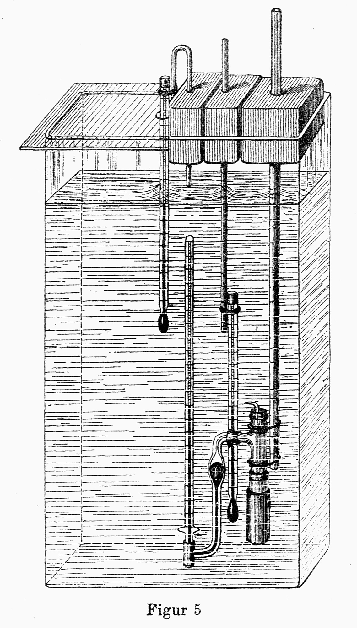 Pfeffersche Zelle (engl. Pfeffer Cell) closed apparatus